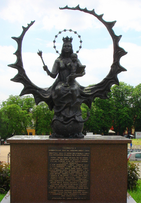 Częstochowa, zespół klasztorny paulinów na Jasnej Górze